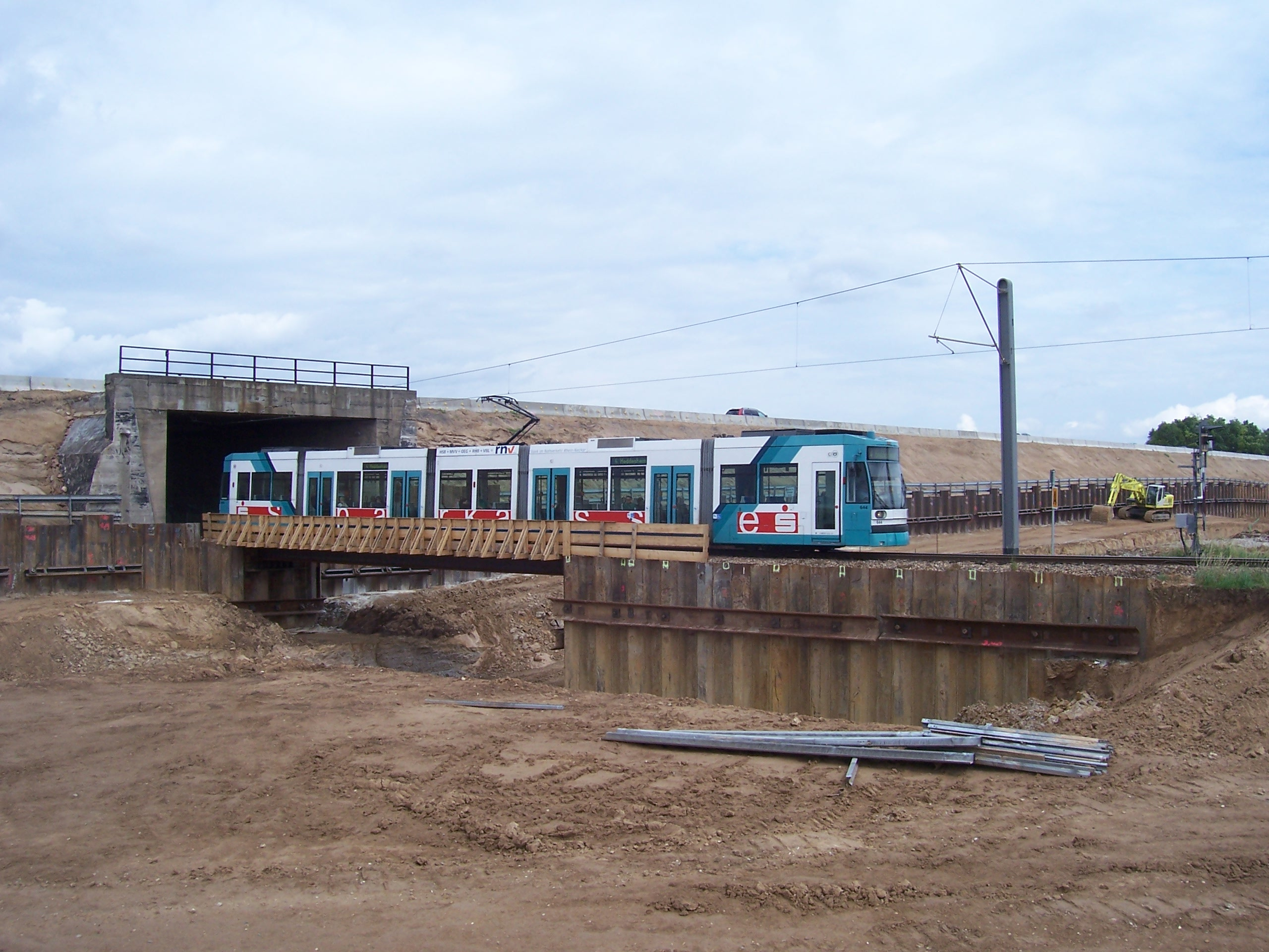 Ein 6MGT überfährt zwischen Mannheim-Wallstadt und Heddesheim an der Baustelle der Autobahn 6 eine Hilfsbrücke. Die Autobahn ist derzeit noch über die Gleise der Bahnstrecke geführt.